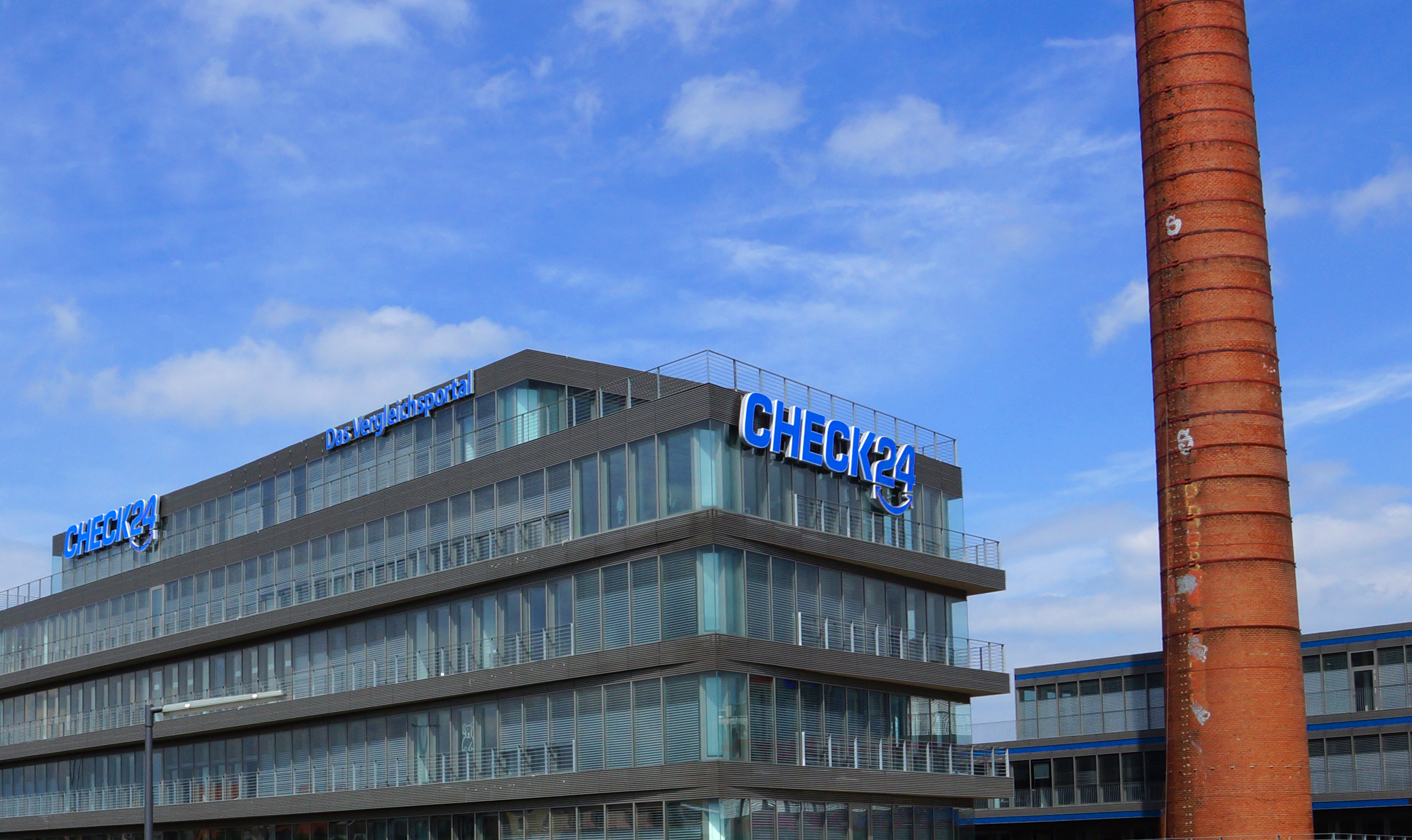 CHECK24-Zentrale in München mit historischem Schornstein